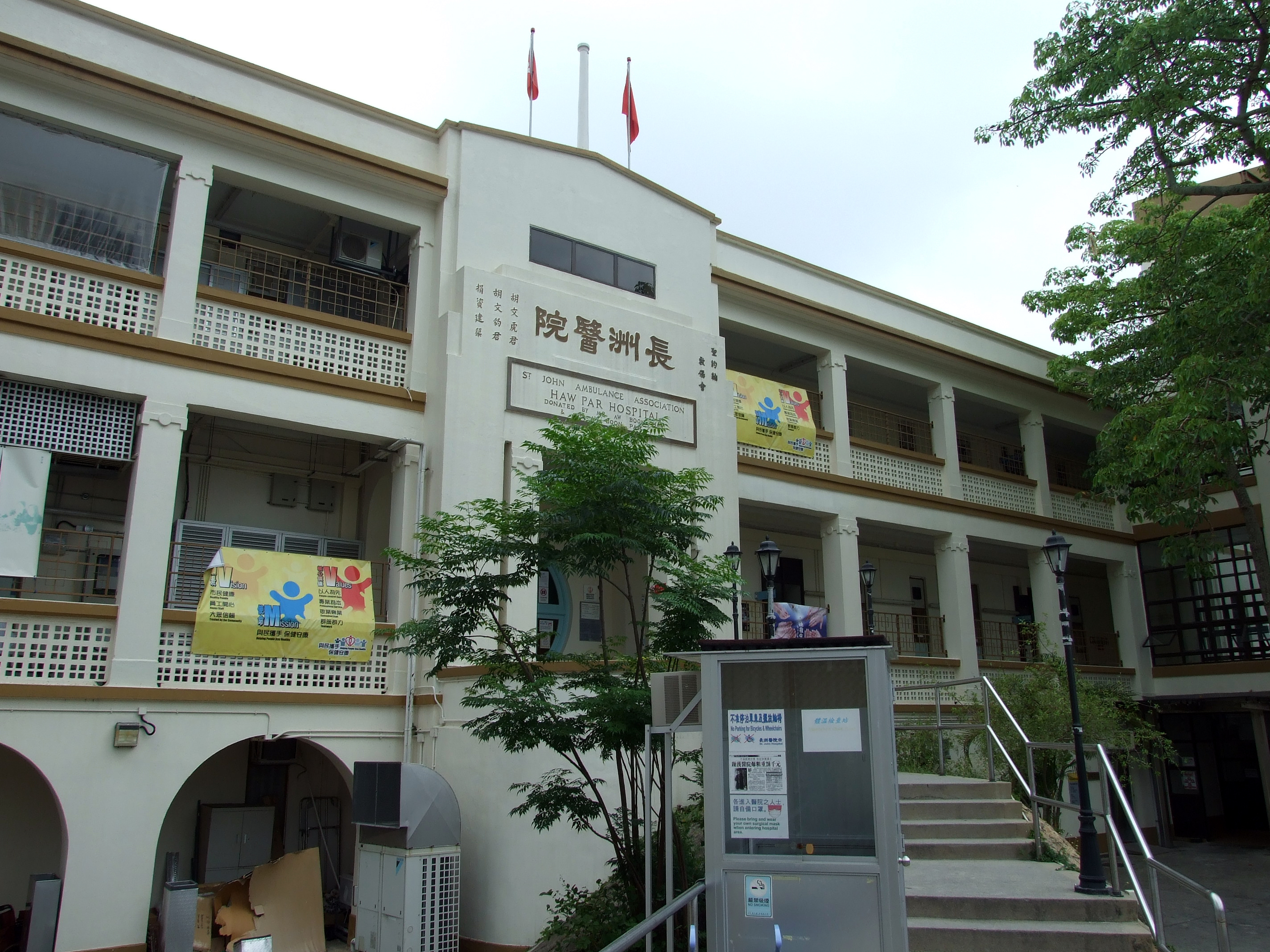 中文（香港）: 長洲醫院